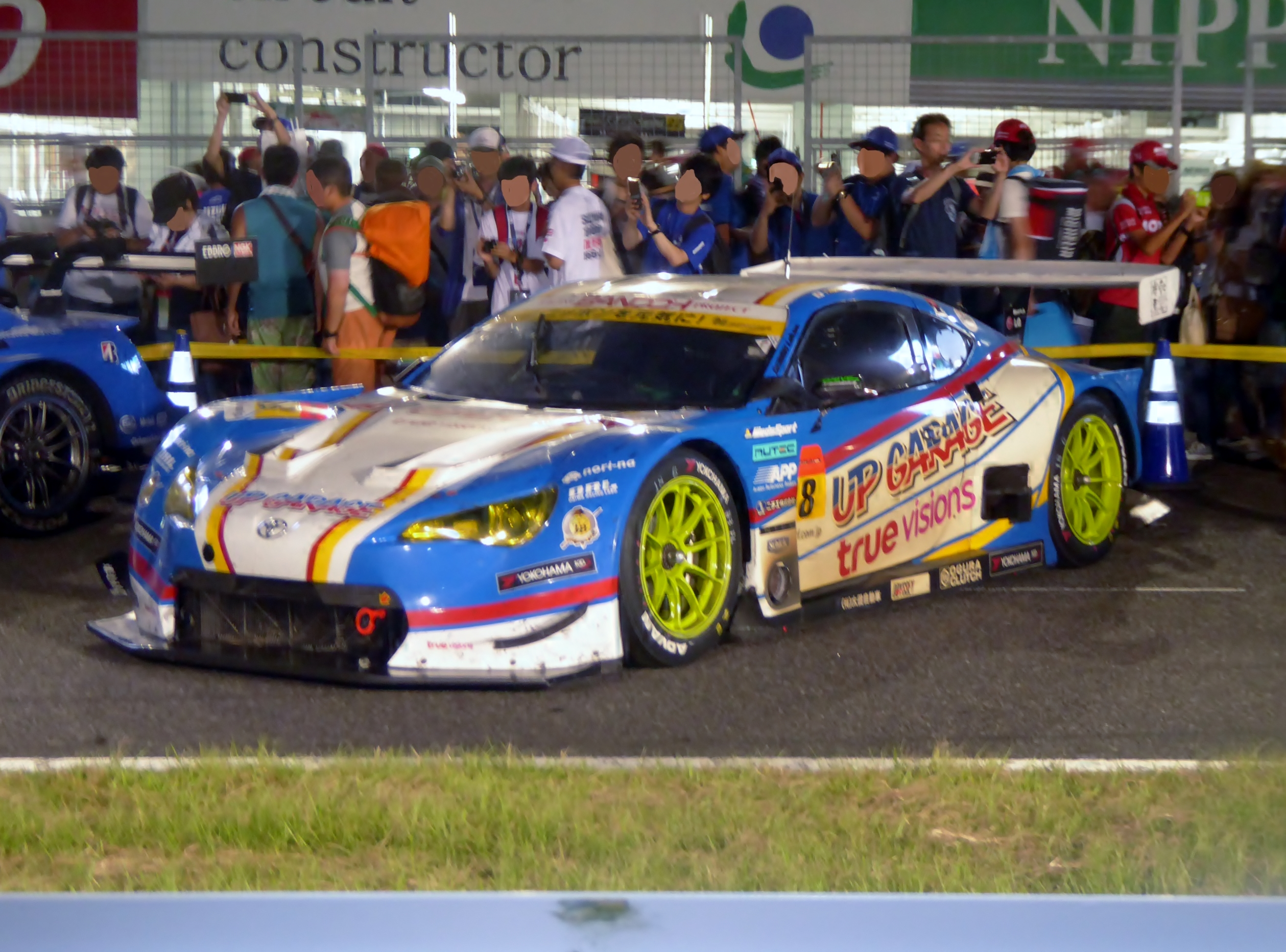 2017年鈴鹿1000㎞終了後の18号車UPGARAGE BANDOH 86を撮影。